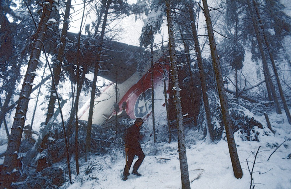 インビクタ・インターナショナル航空435便は1973年4月10日に墜落事故を起こし、108人が死亡した。